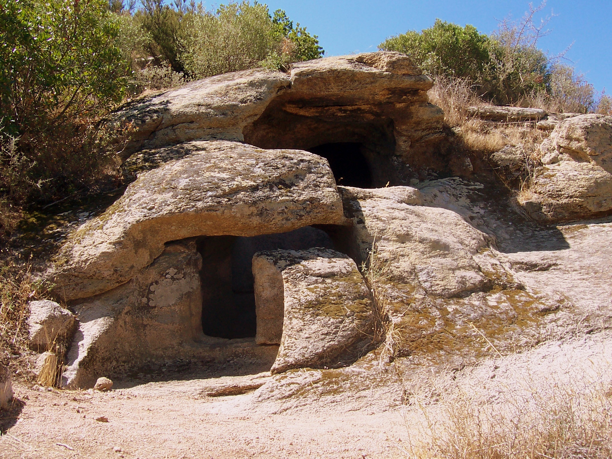 Una domus de Janas nella Necropoli Prenuragica di Lotzorai (Og)